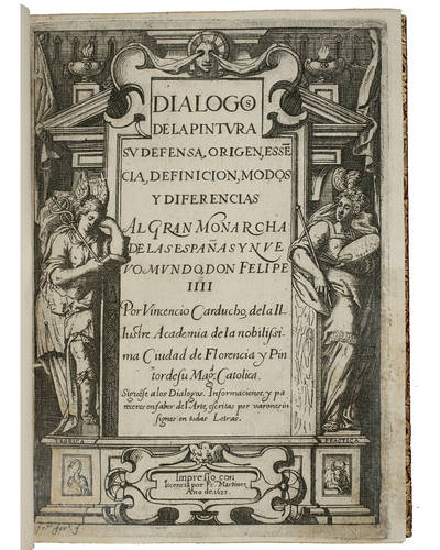 Vicente Carducho, Diálogos de la Pintura, portada de la primera edición con grabados de Francisco Fernández